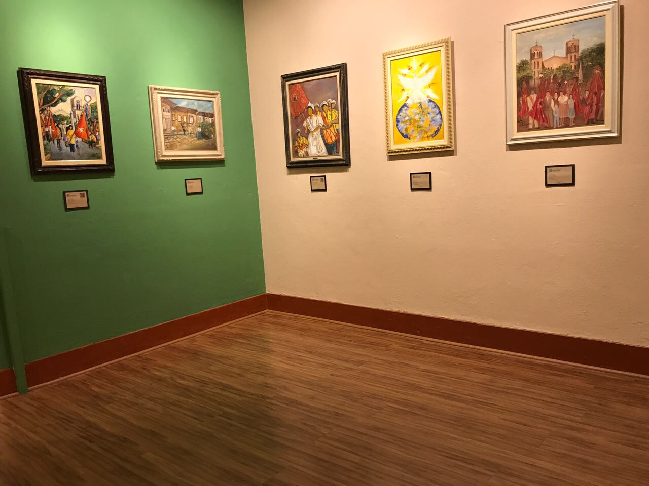 Parte do museu em que é retratada festa típica religiosa da cidade, A Festa do Divino Espírito Santo.